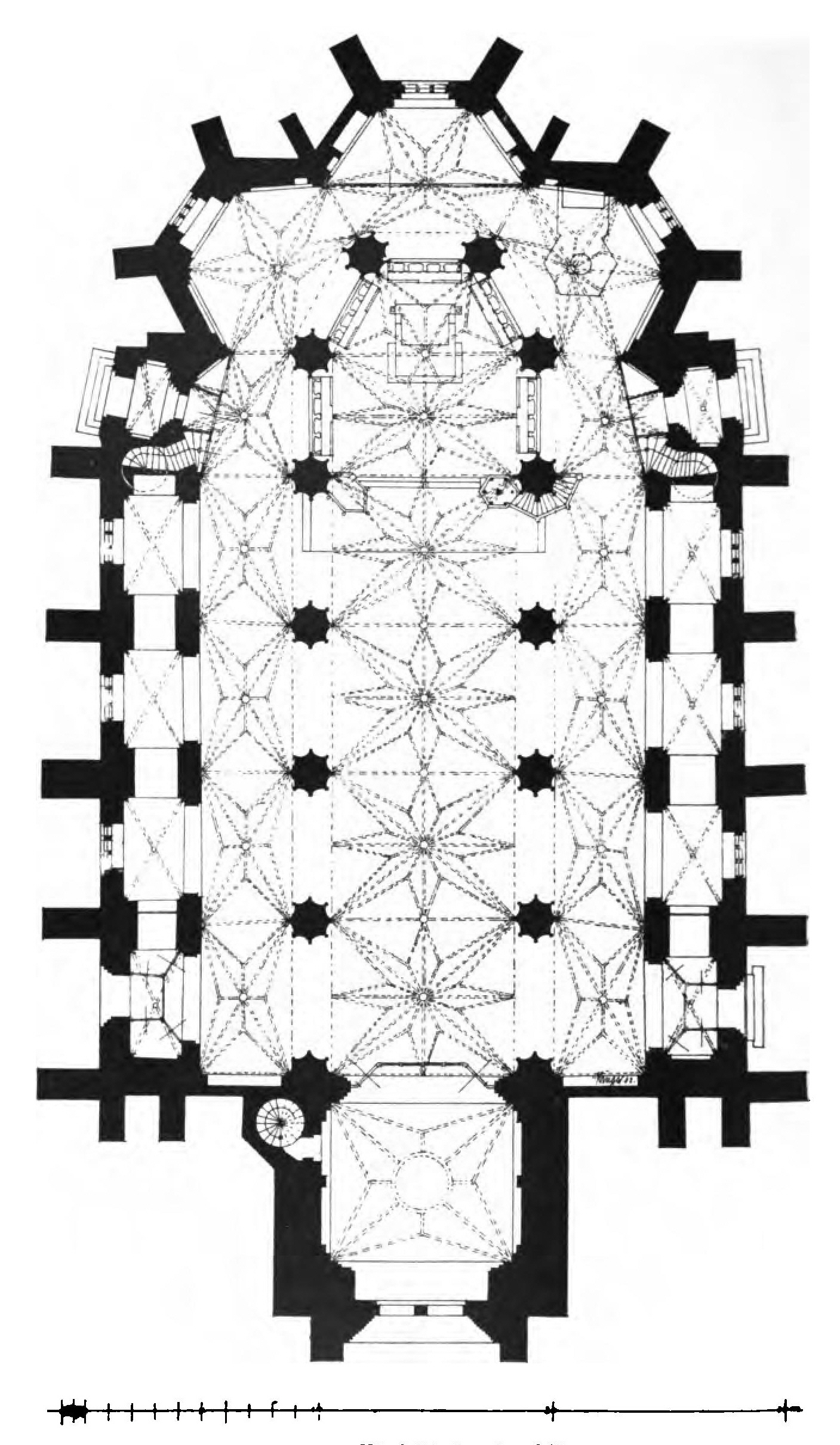 Lüneburg, St. Nicolai, Grundriss